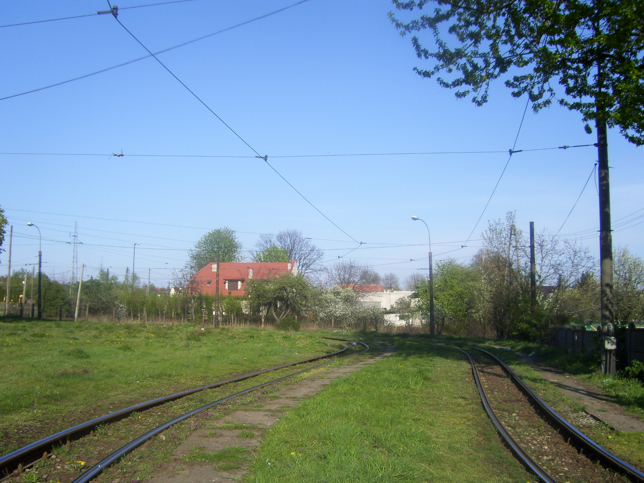 Pętla tramwajowa dla linii 15 przy ul. Telefonicznej.